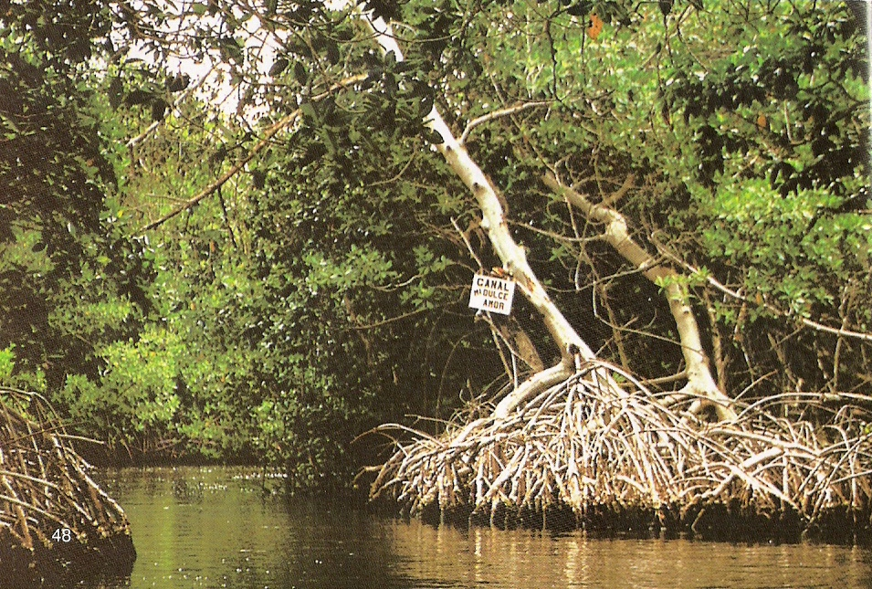 Canales del Parque Nacional "Laguna de la Restinga"